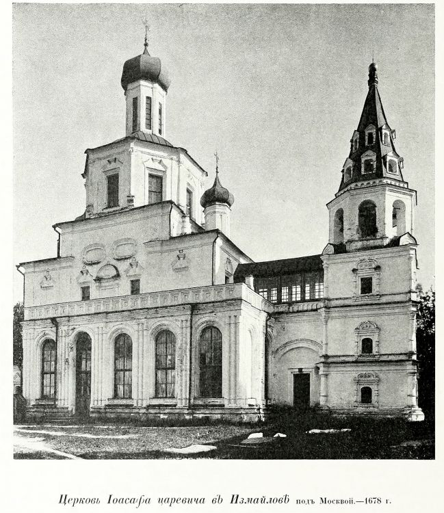 Церковь святого Царевича Иоасафа в царской усадьбе Измайлово (1684—1687 гг.). Перестроена из церкви 1678—1679 гг. Снесена в 1937 году. Оригинальное фото сделано вероятно в 1900 году и потом опубликовано во втором томе книги «История русского искусства» Игоря Эммануиловича Грабаря, изданном в Москве в 1910 году.